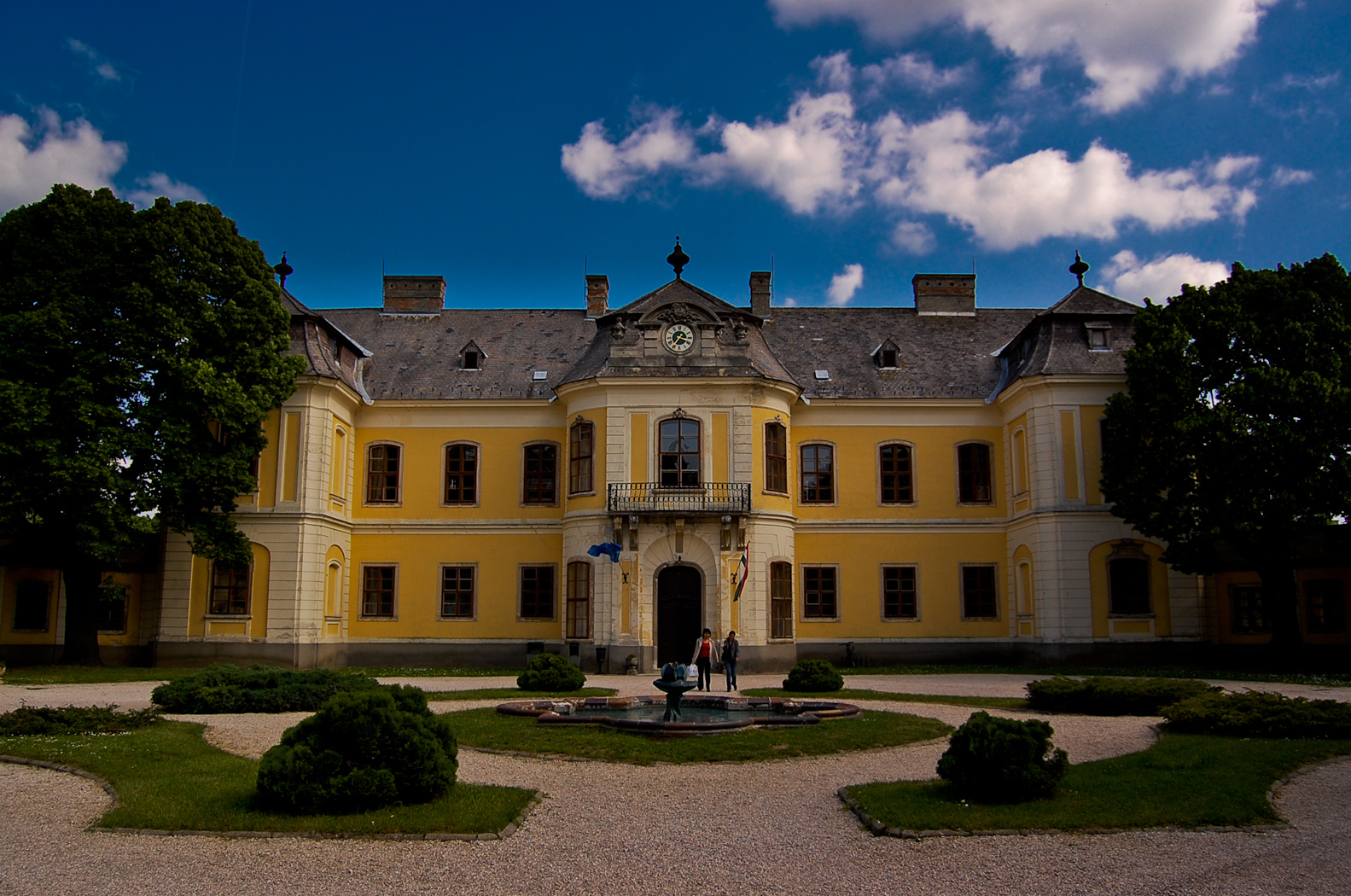 volt Lamberg kastély (Mór, Szent István tér 5/A.)